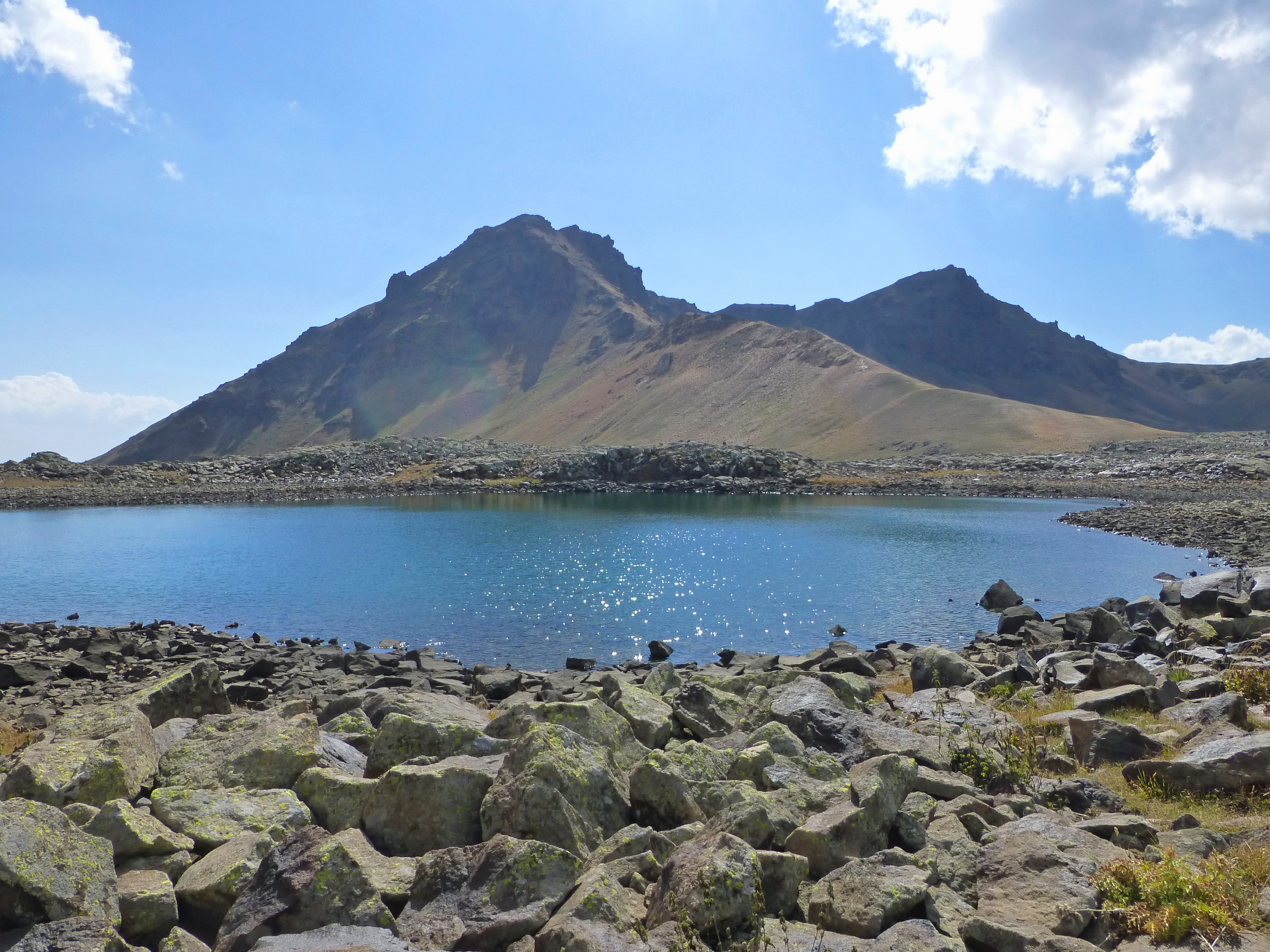 Lac d'Oughtasar (Arménie)